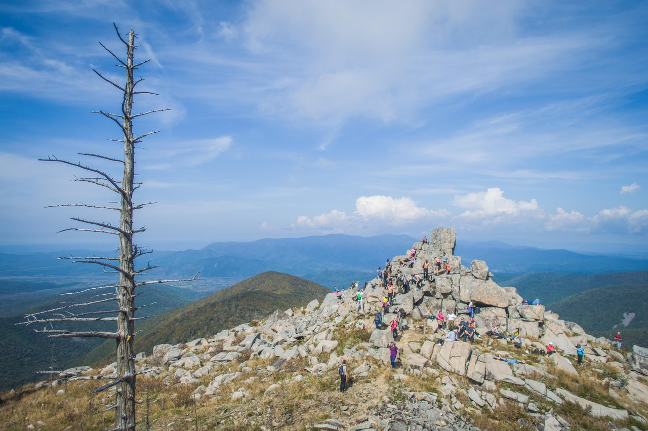 нет описания